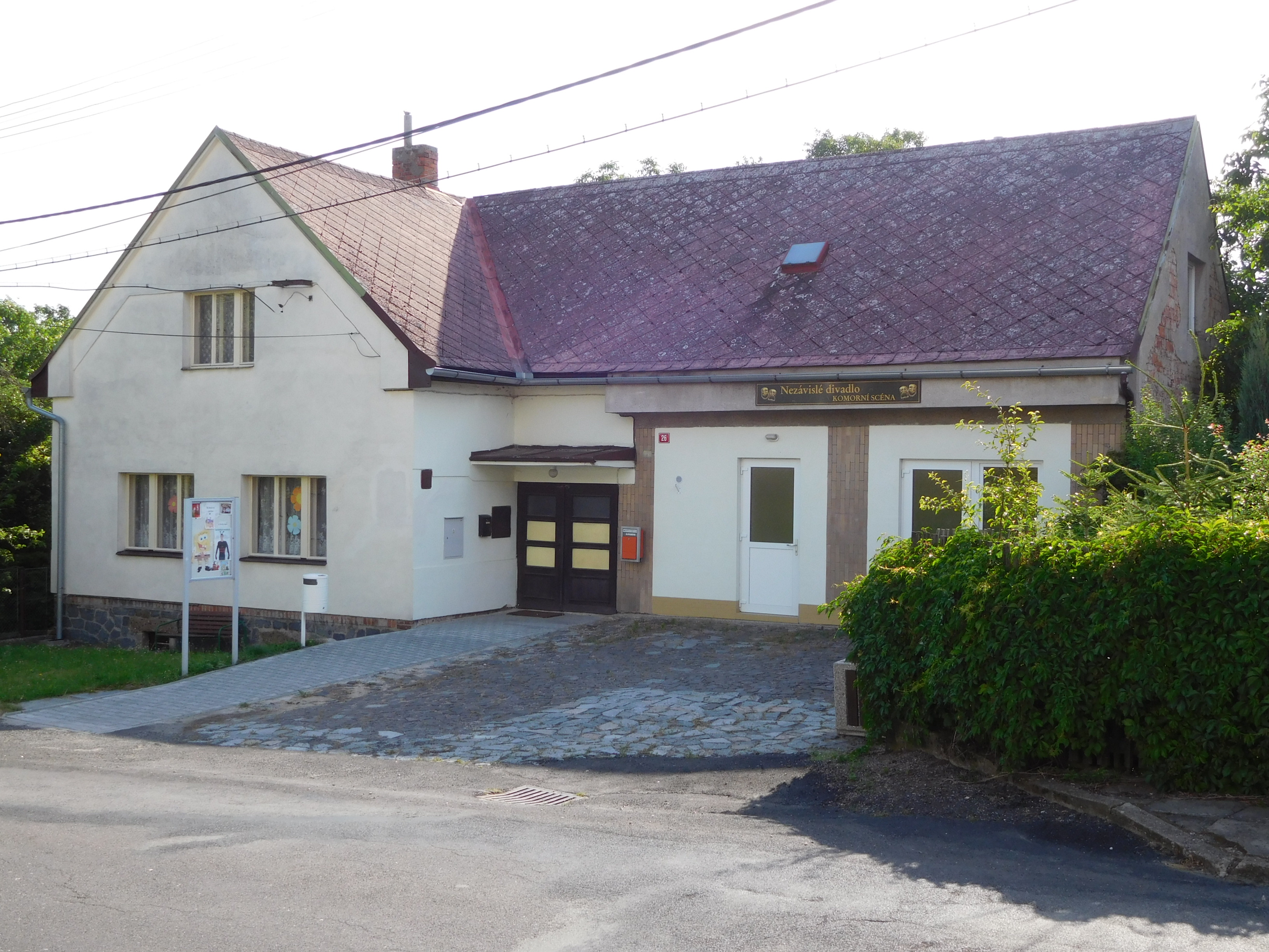 Holé Vrchy - divadlo (č.p. 26)